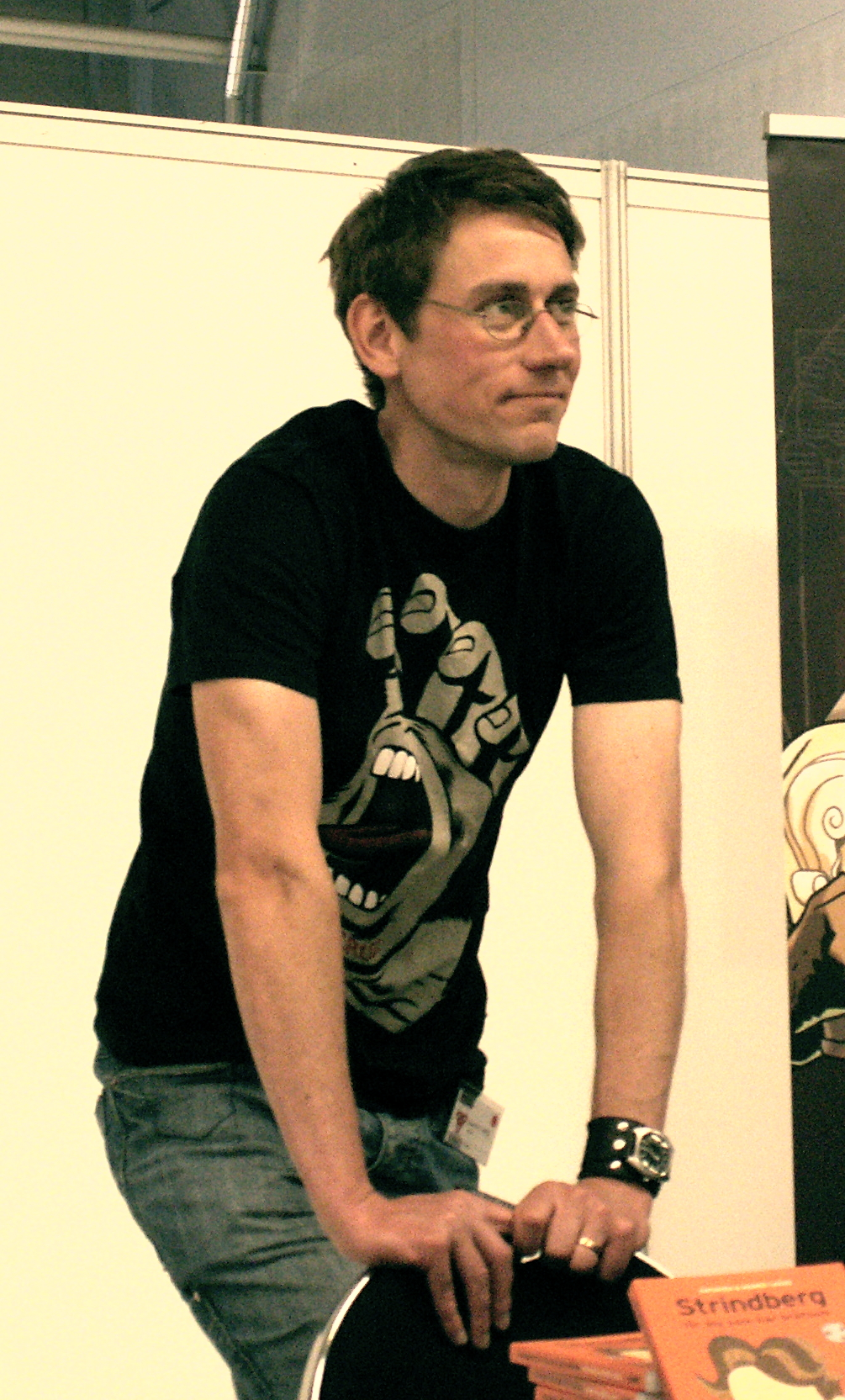 Henrik Lange, på mässan Carlstad Comic Con 27 maj 2012.